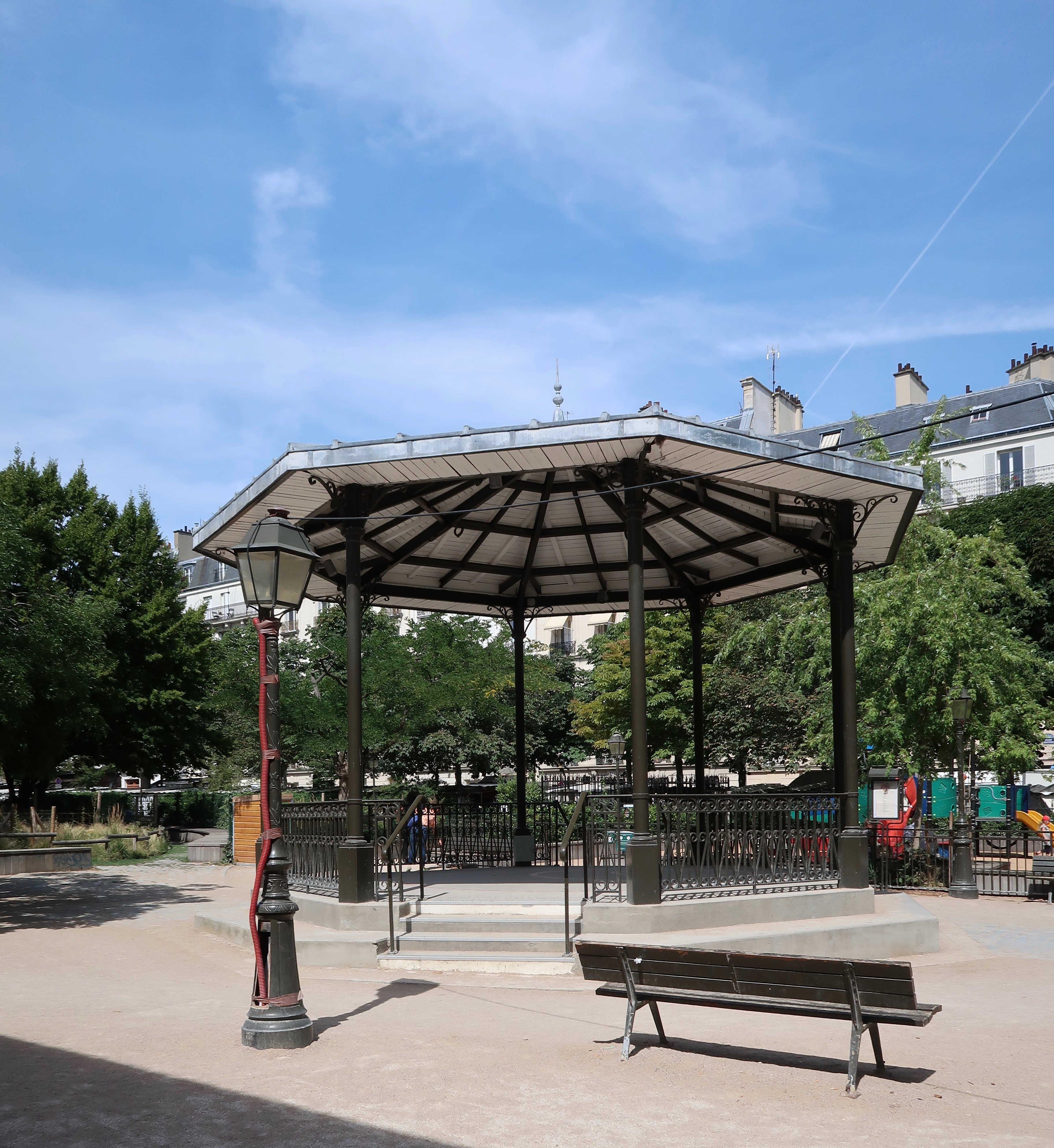 Kiosque square d'Anvers (Paris, 9e).